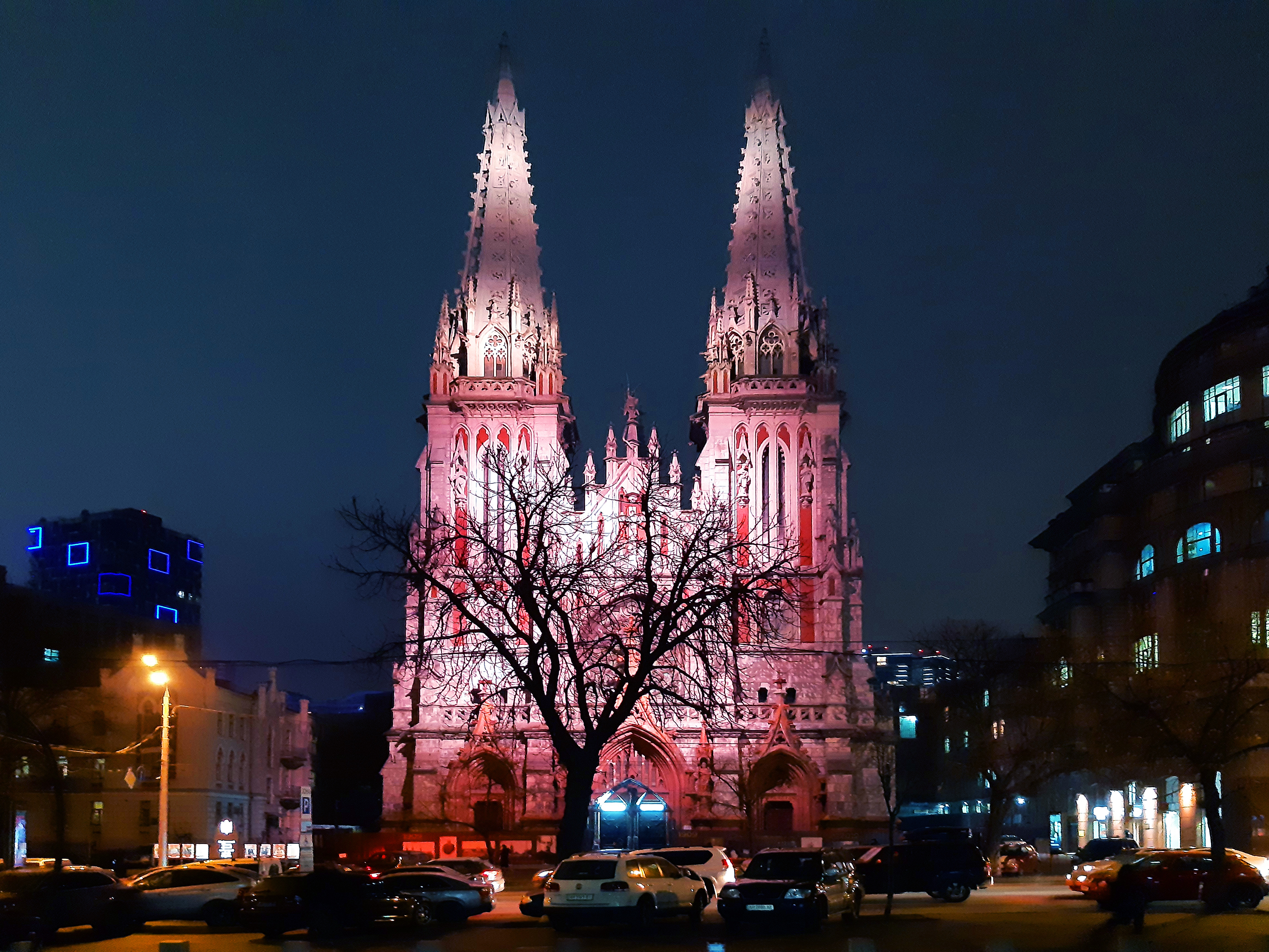 Костьол св. Миколая, Київ, Велика Васильківська вулиця, 77